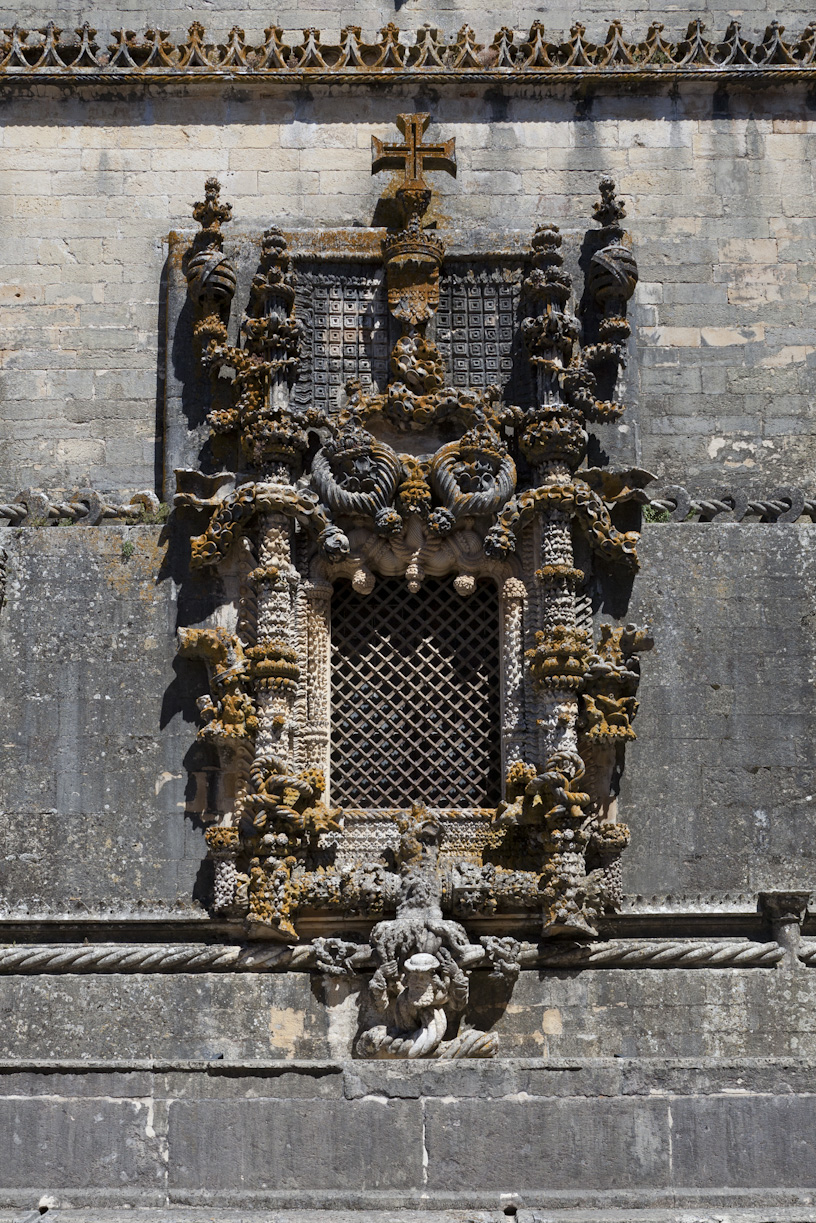 Janela manuelina, Convento de Cristo